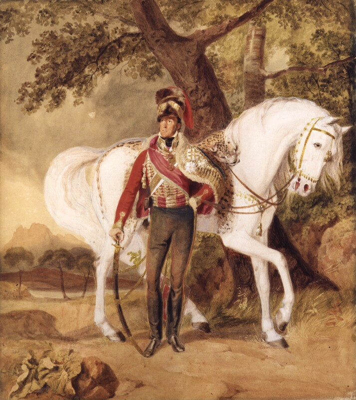 Stapleton Cotton, 1st Viscount Combermere (1773-1865), British general and Field Marshal.